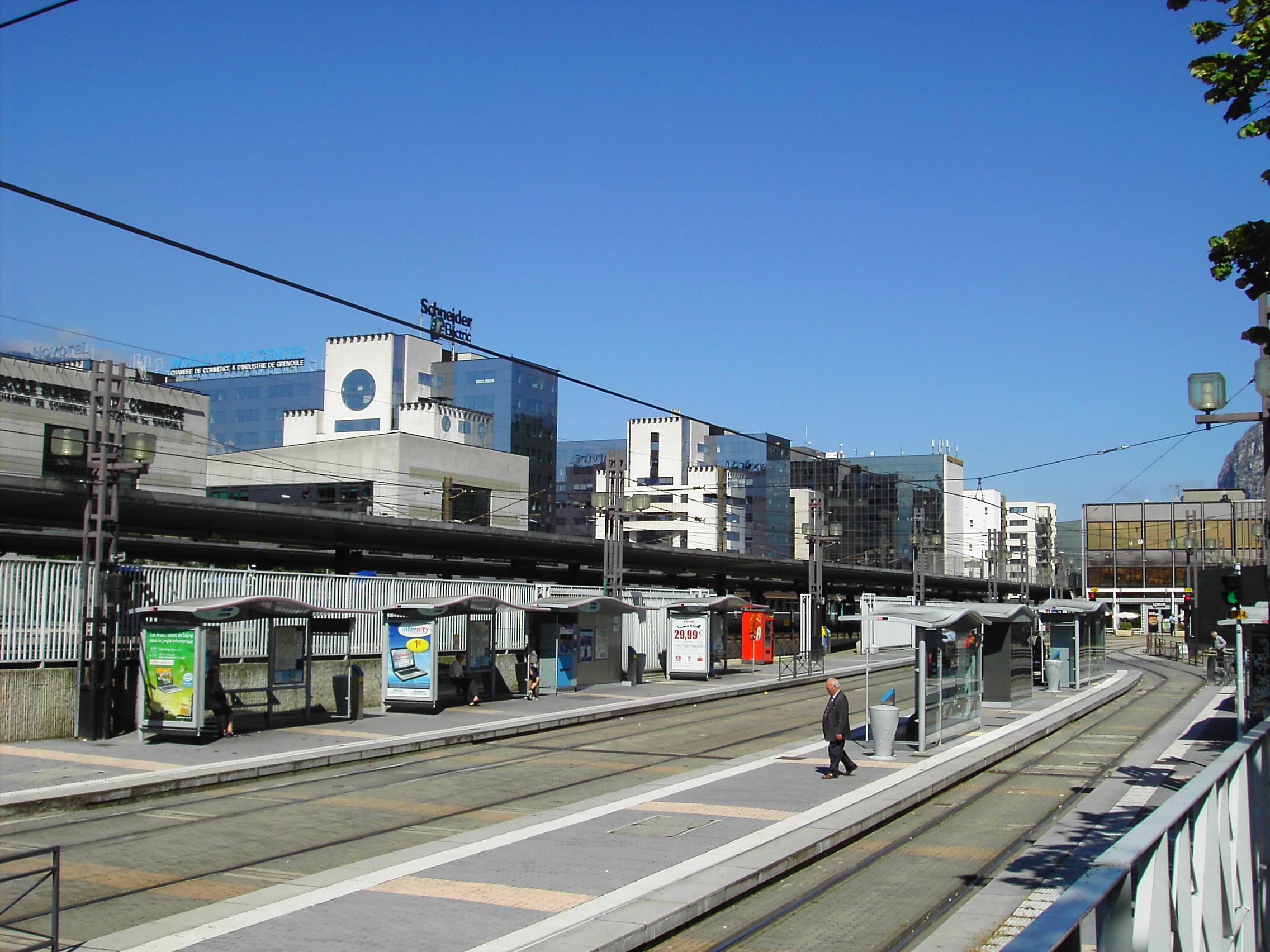 Station de tramway, quartier d'affaire Europole au fond - Grenoble